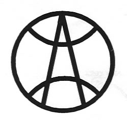 logo_pongyi2.jpg